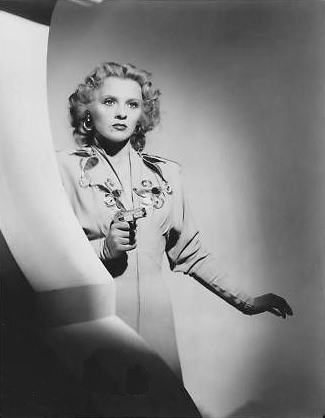 Ilona Massey az "Invisible Agent" című filmben